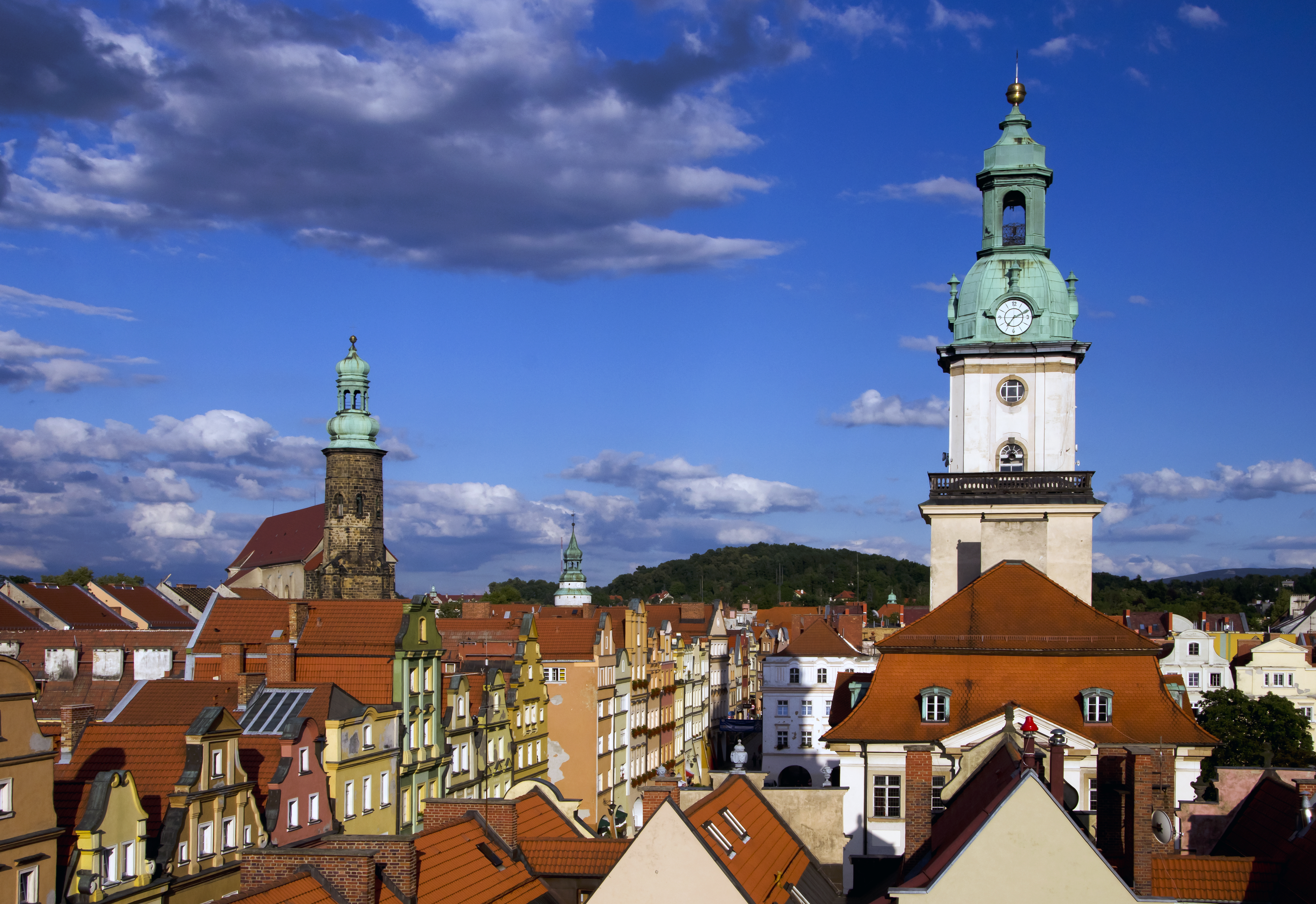 Widok na historyczne centrum Jeleniej Góry, z wieżą ratusza po prawej i wieżę kościoła św. św. Erazma i Pankracego po lewej. 11.1956; 82.